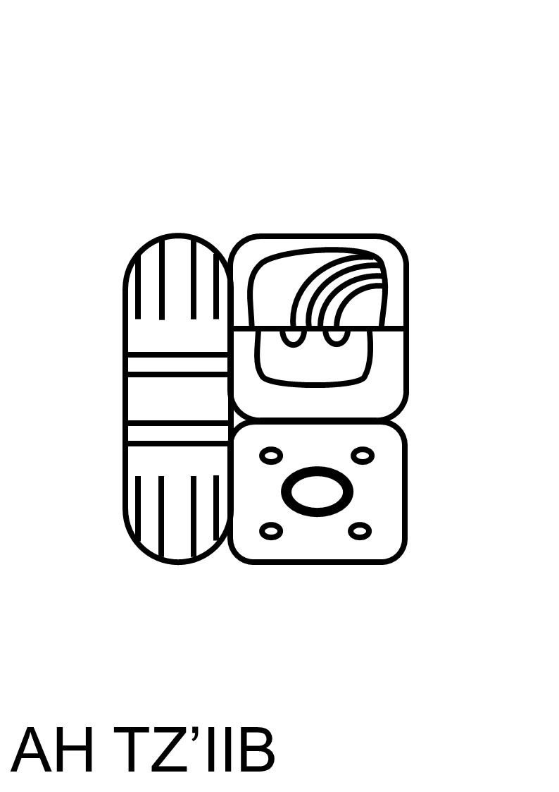 AH TZ'IIB (Scribe) en Syllabogramme